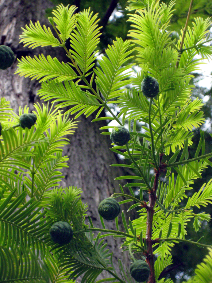 Riesenmammutbaum